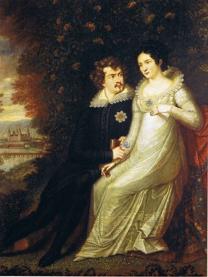 Das Kronprinzenpaar Ludwig und Therese von Bayern vor Aschaffenburg